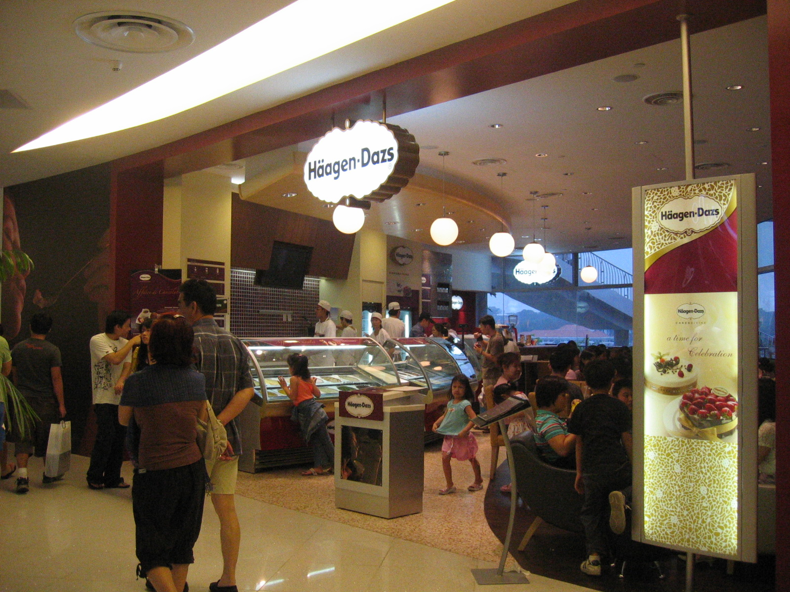 Haagen Dazs store at VivoCity, Singapore.